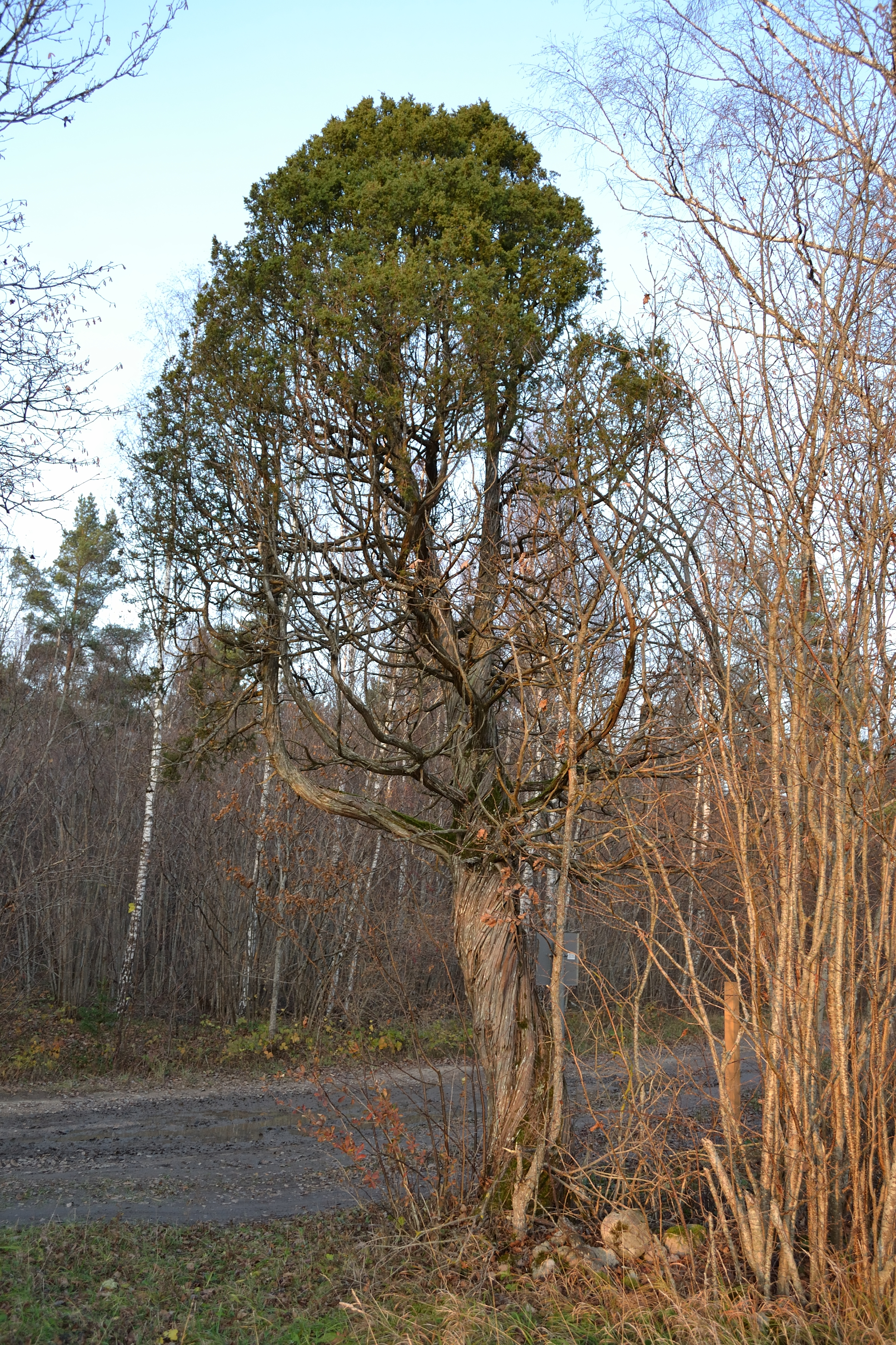 Loigu keerdkadakas Keilas Unknown